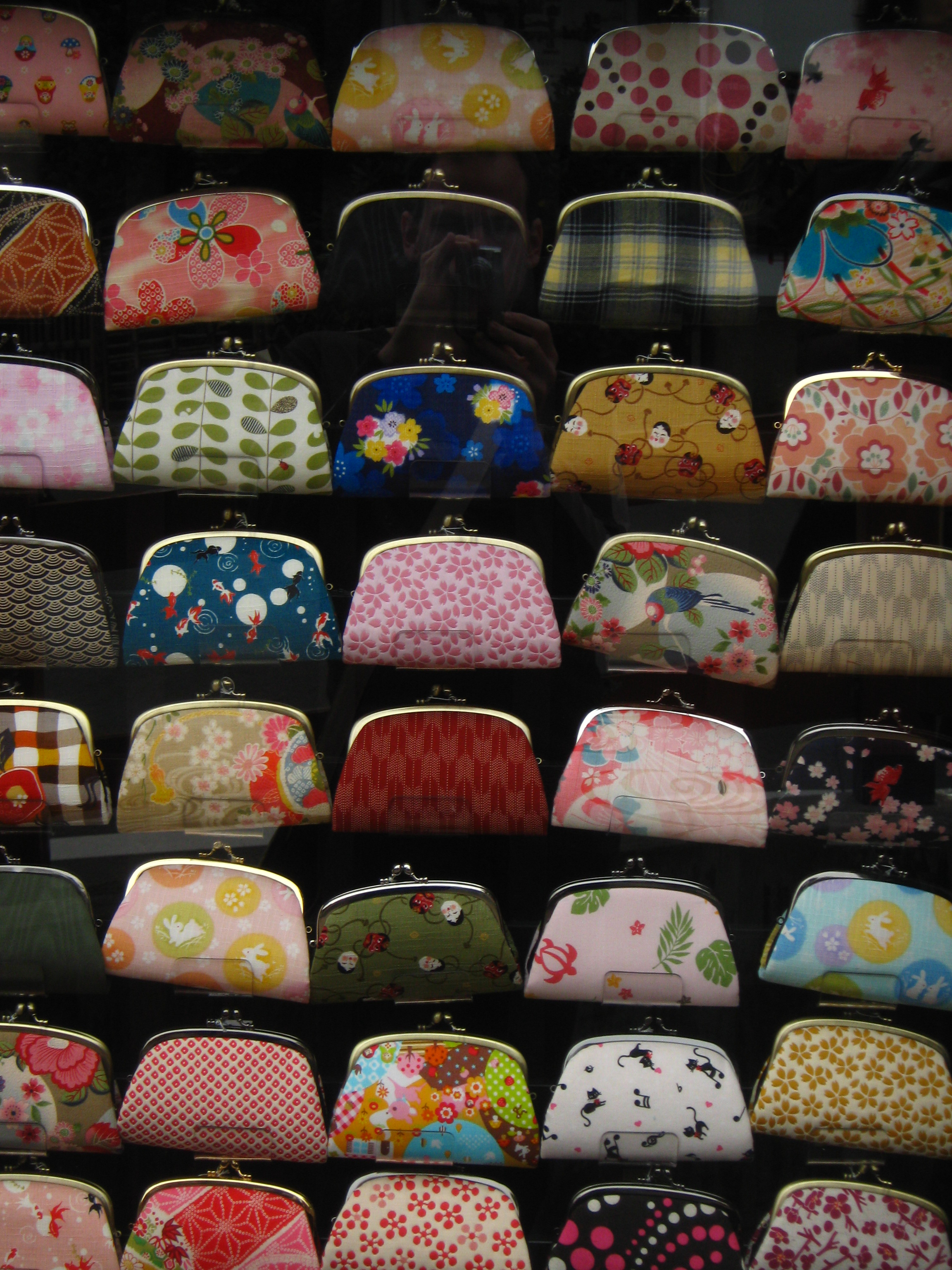 Kyoto